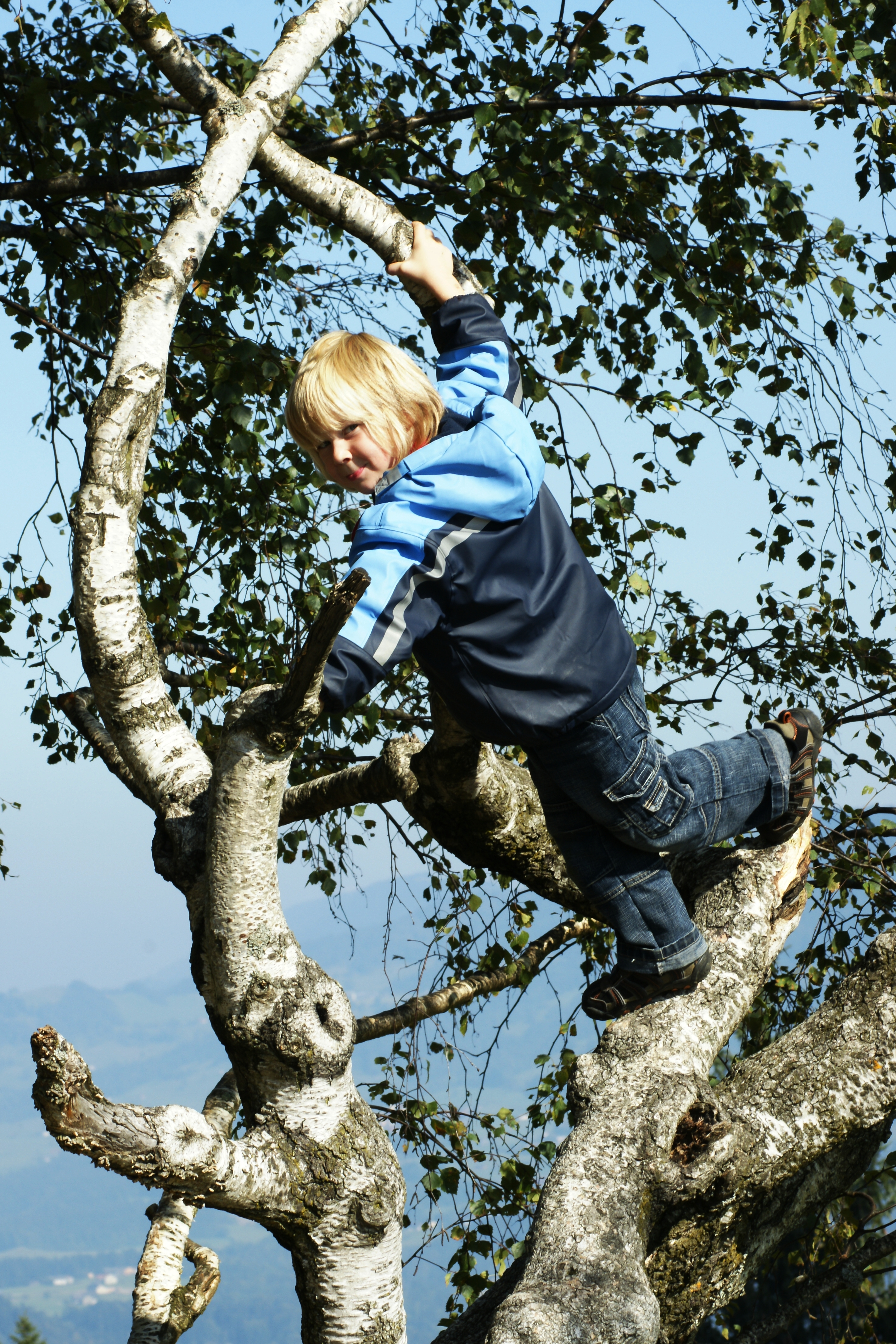 Gymnastik (klettern) eines Kleinkindes 4 1/2Jahre auf eine Birke.